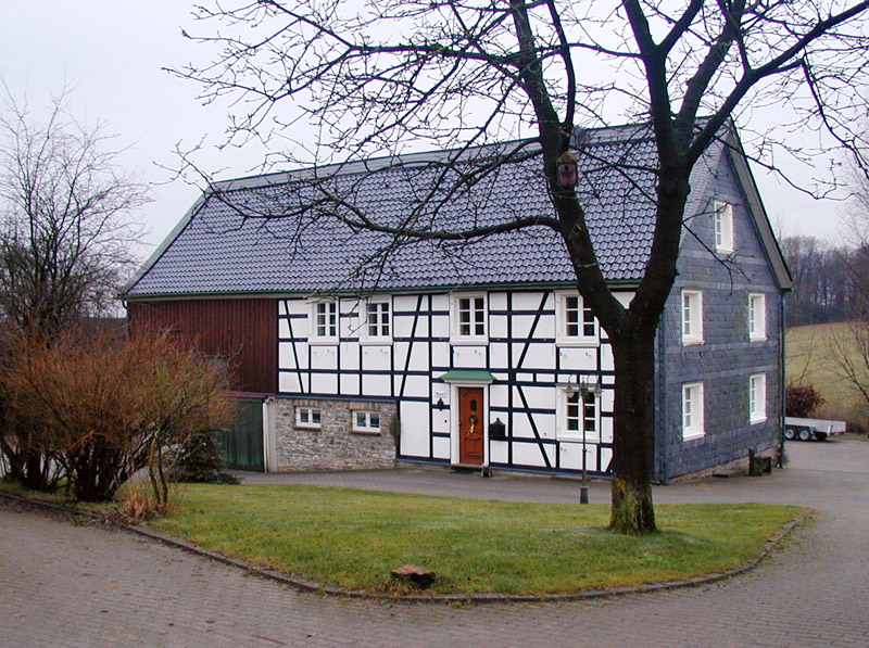 Hückeswagen: Ansicht in Wüste